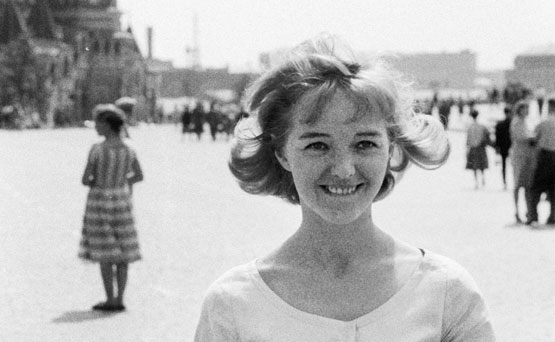 Suomalainen näyttelijä Elina Salo (s. 1936) vuonna 1961 Moskovan Punaisella torilla filmifestivaalien aikaan.